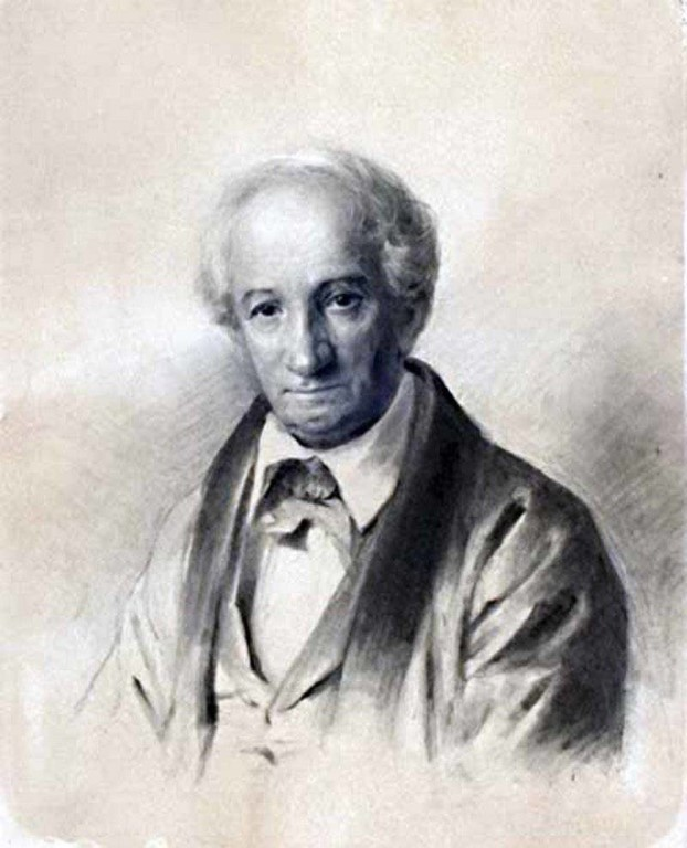 Макси́м Ники́форович Воробьёв (6 (17) августа 1787, Псков — 30 августа (11 сентября) 1855, Санкт-Петербург) — русский живописец; занимает значительное место в истории русской живописи как художник и как наставник целого поколения русских пейзажистов.9